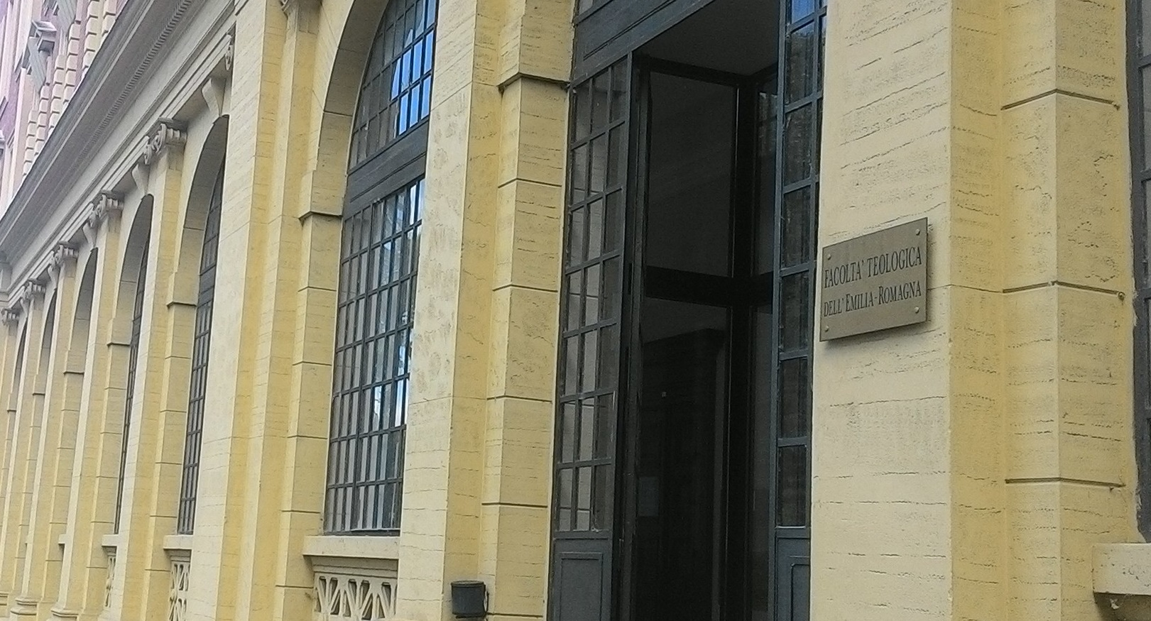 Ingresso laterale